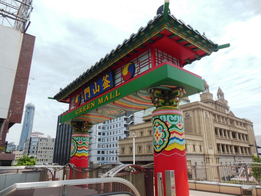 グリーンモール商店街